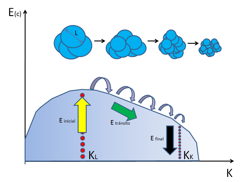 Gráfica que representa la disminución de la energía de la turbulencia.